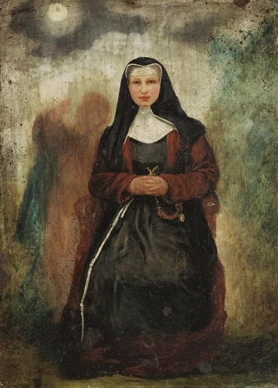 Ordensgründerin Rosa Flesch